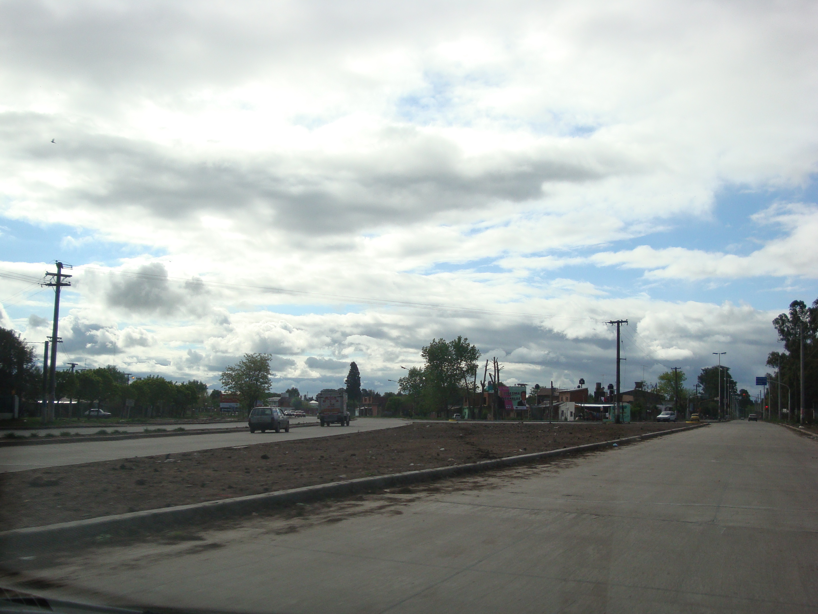 Ruta Provincial 21, en González Catán, Provincia de Buenos Aires.